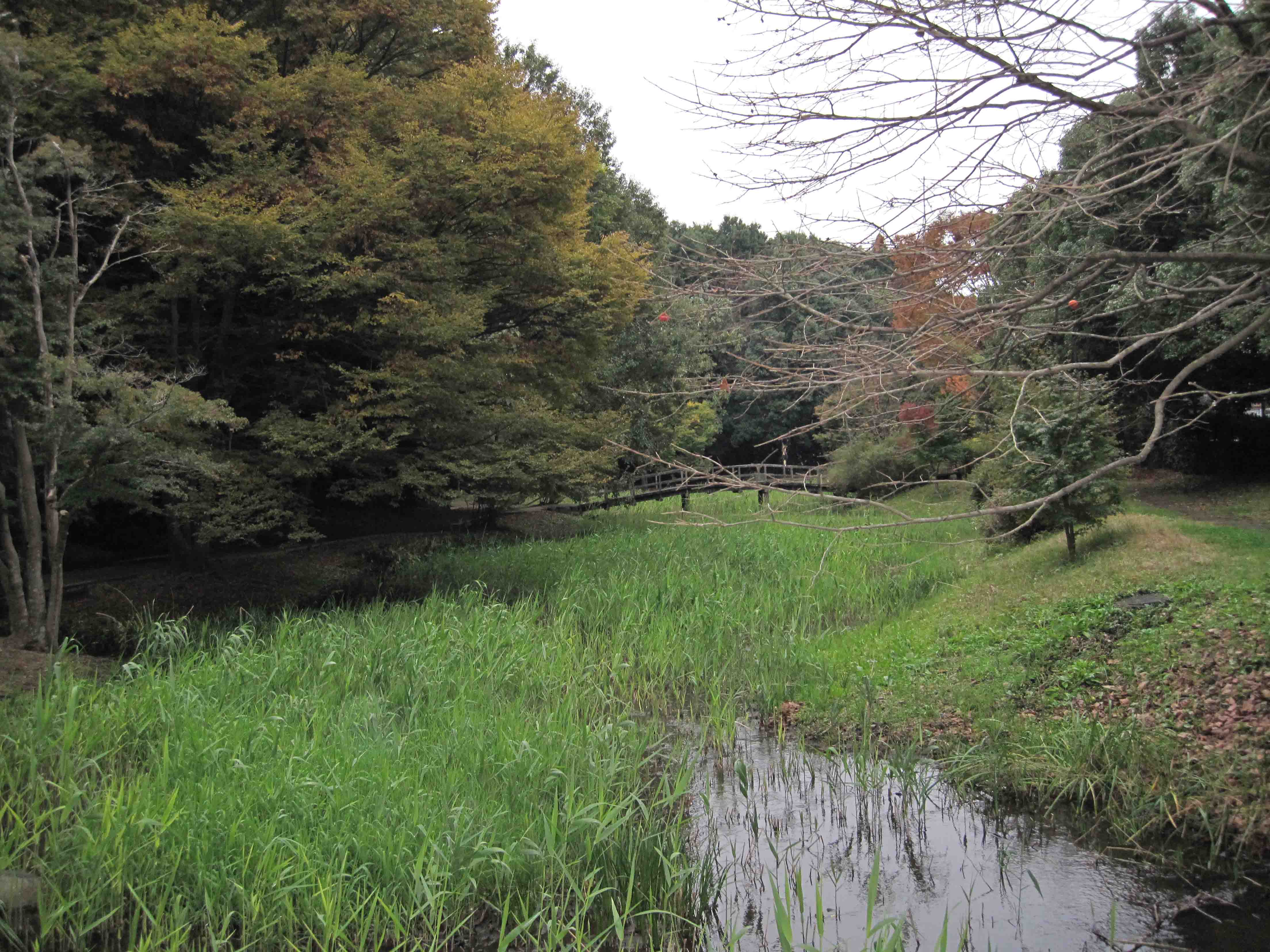 道保川公園風景